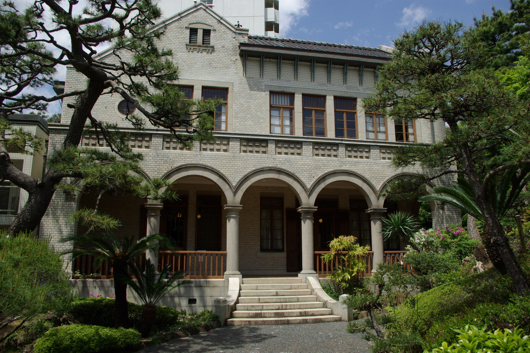 旧神谷伝兵衛稲毛別荘